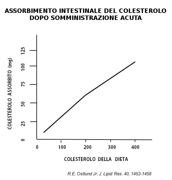 Studio dell'assorbimento intestinale del colesterolo dopo somministrazione acuta.